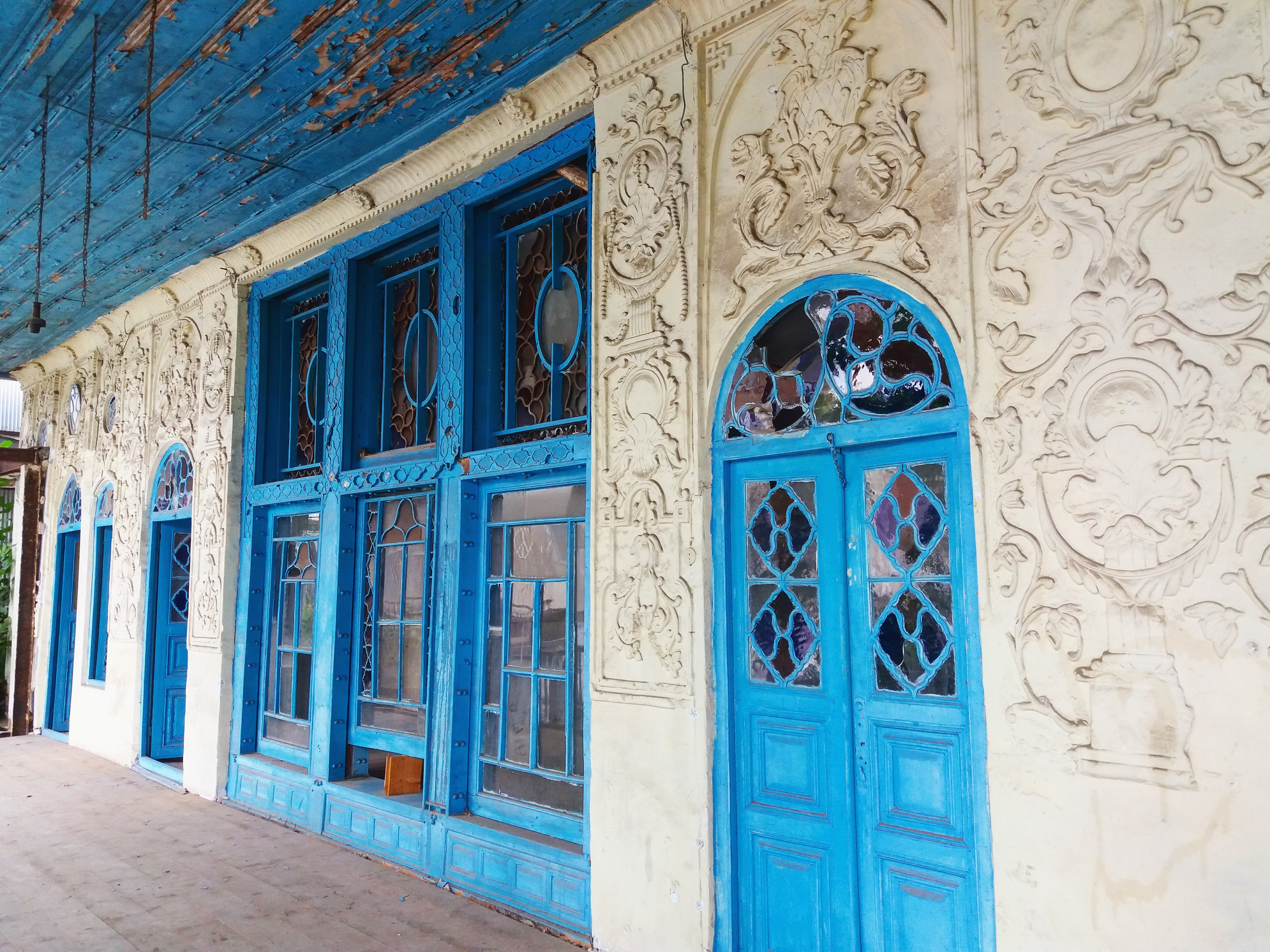 خانه آوانسیان